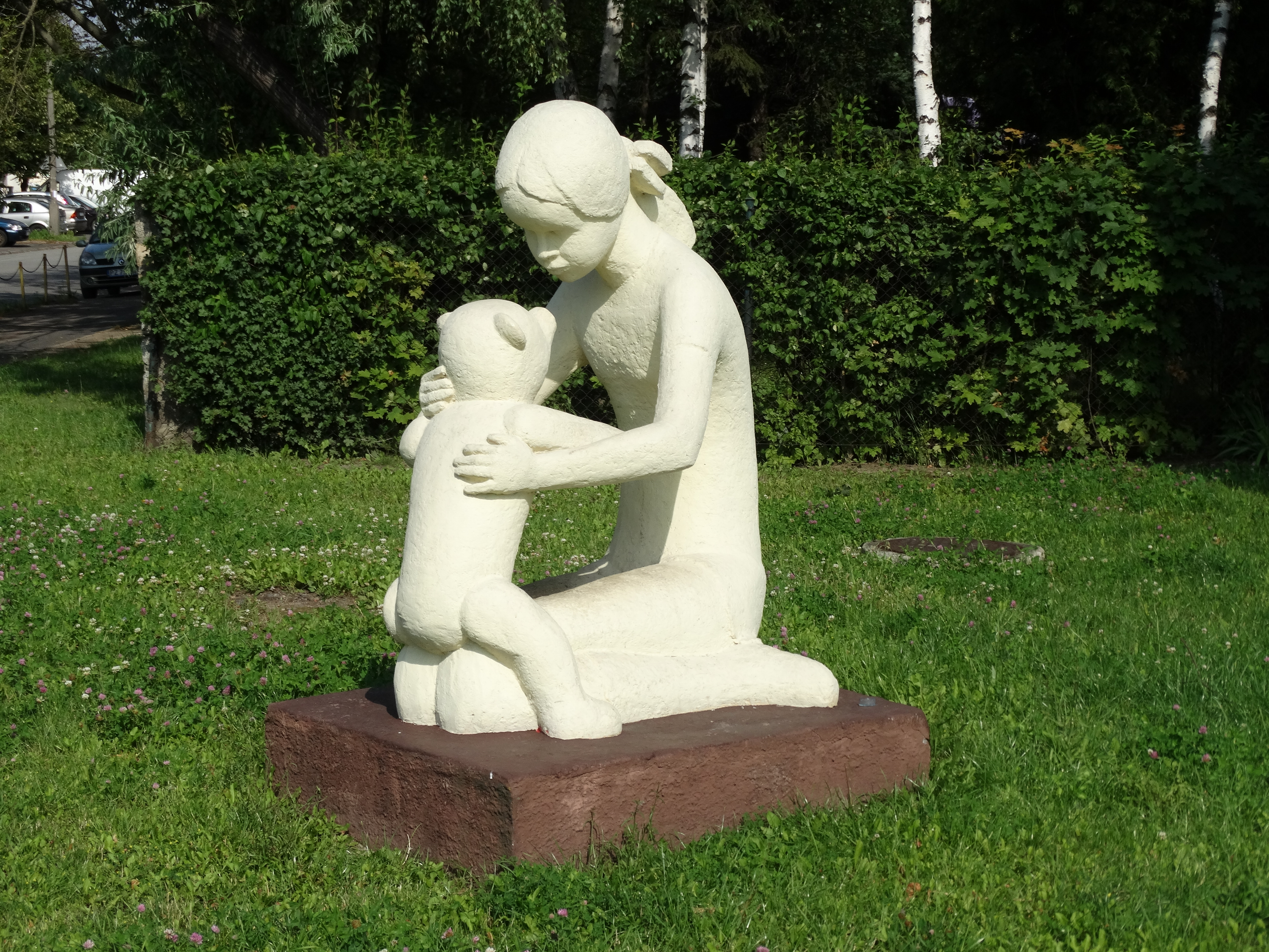 Rzeźba plenerowa Dziewczynka z misiem. Autor: Zofia Ulatowska-Gosławska, 1976, beton. Os. Bohaterów II Wojny światowej w Poznaniu.